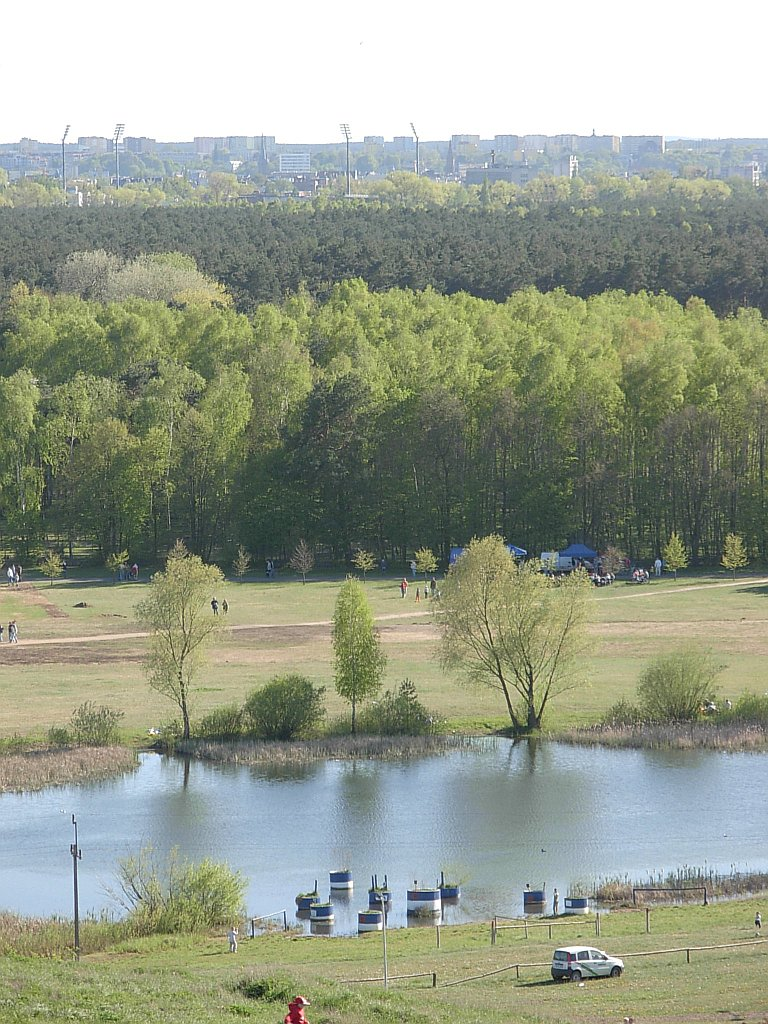 Widok z Góry Myslęcińskiej